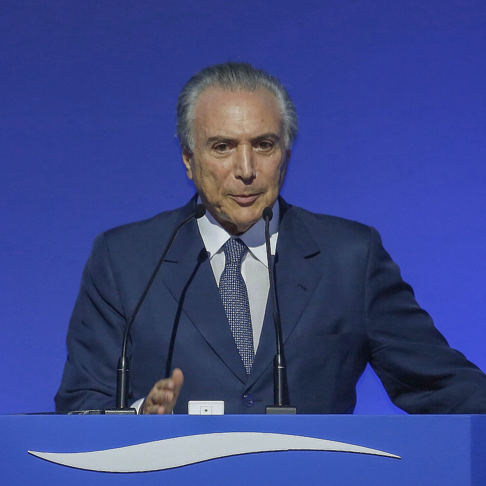 Michel Temer abre o 3º Prêmio Líderes do Brasil no Palácio dos Bandeirantes em 9 de dezembro de 2013.